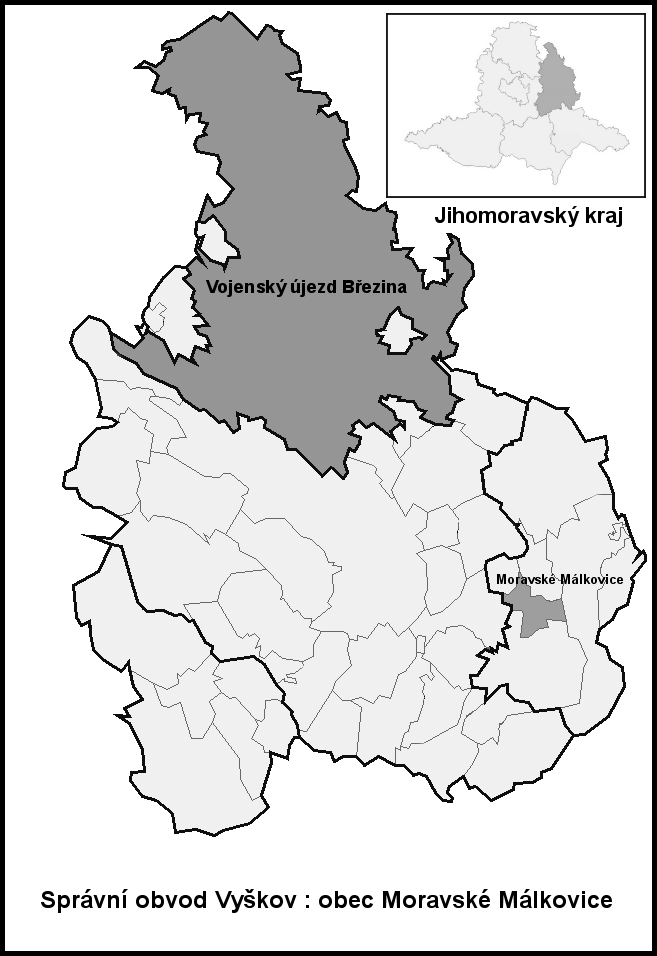 Hranice Moravské_Málkovice (Vyškov- czech republic)